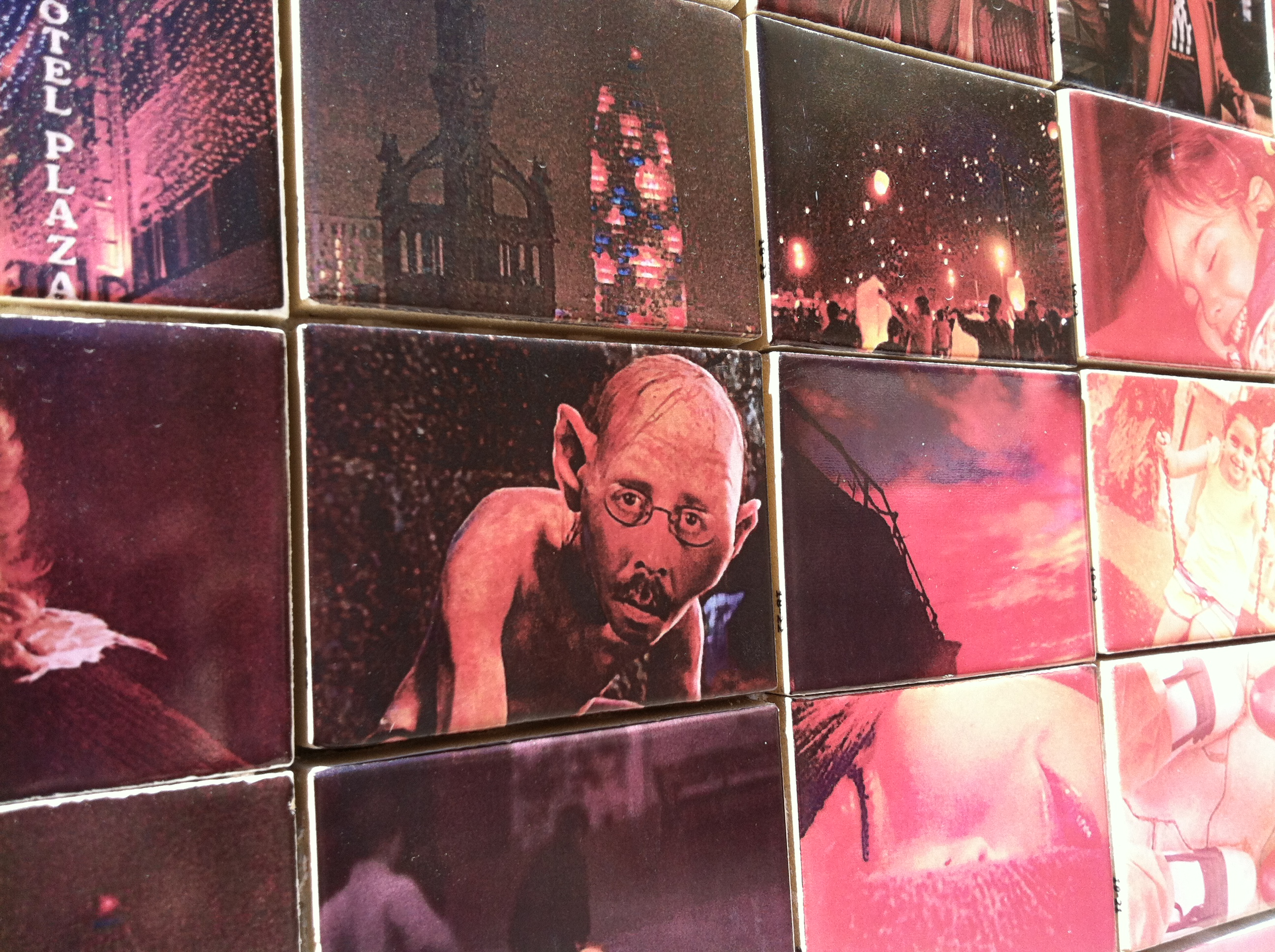 El món neix en cada besada- Joan Fontcuberta